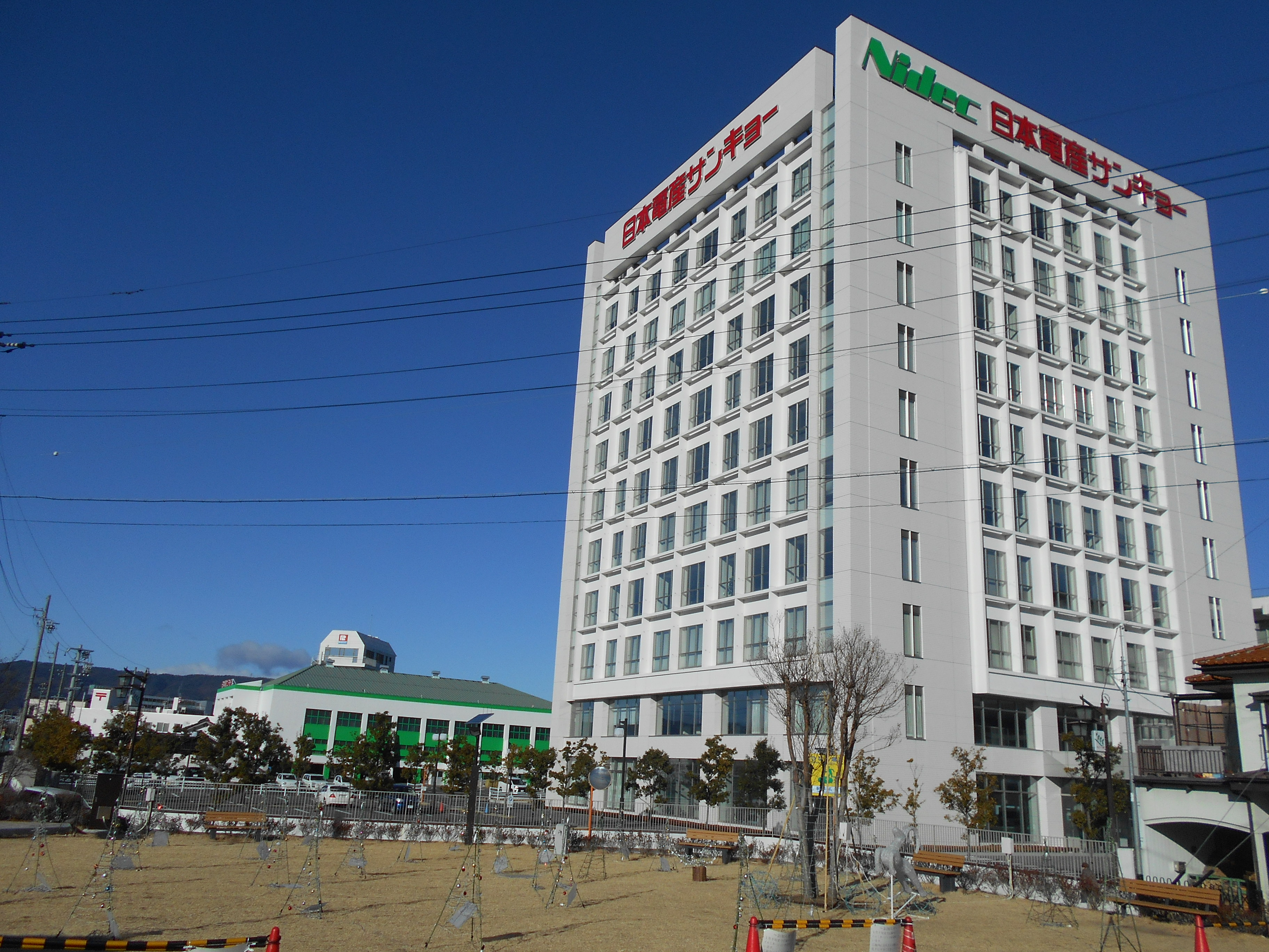 日本電産サンキョー株式会社 本社